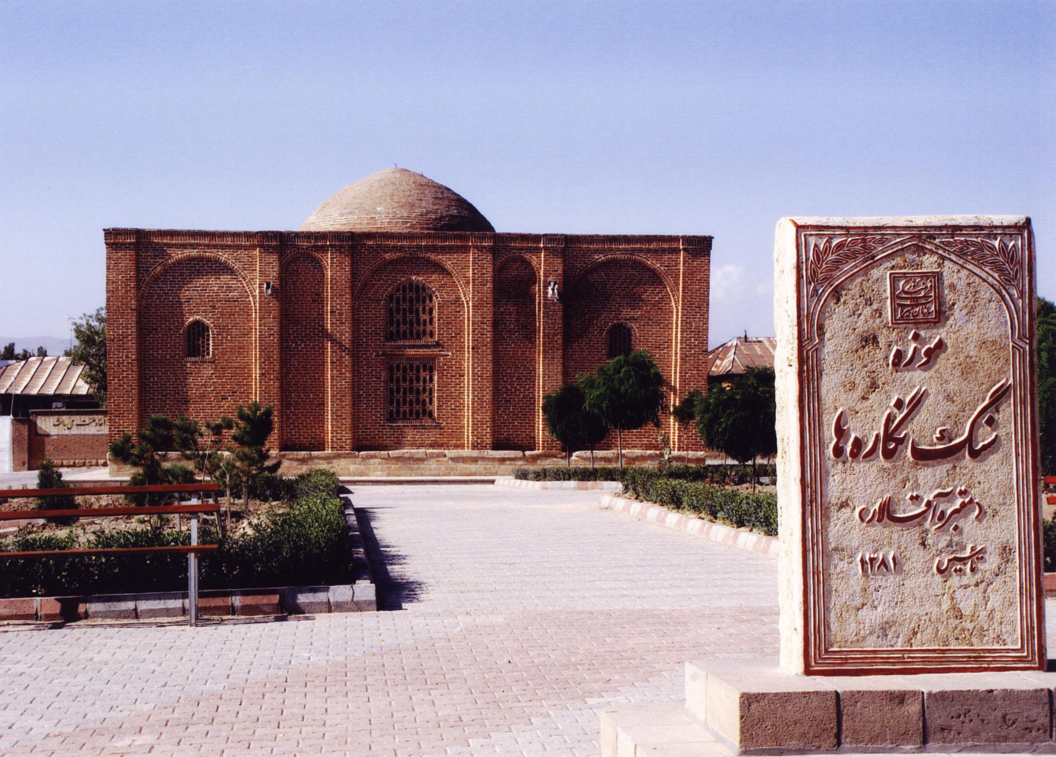 مقبره آقا لار